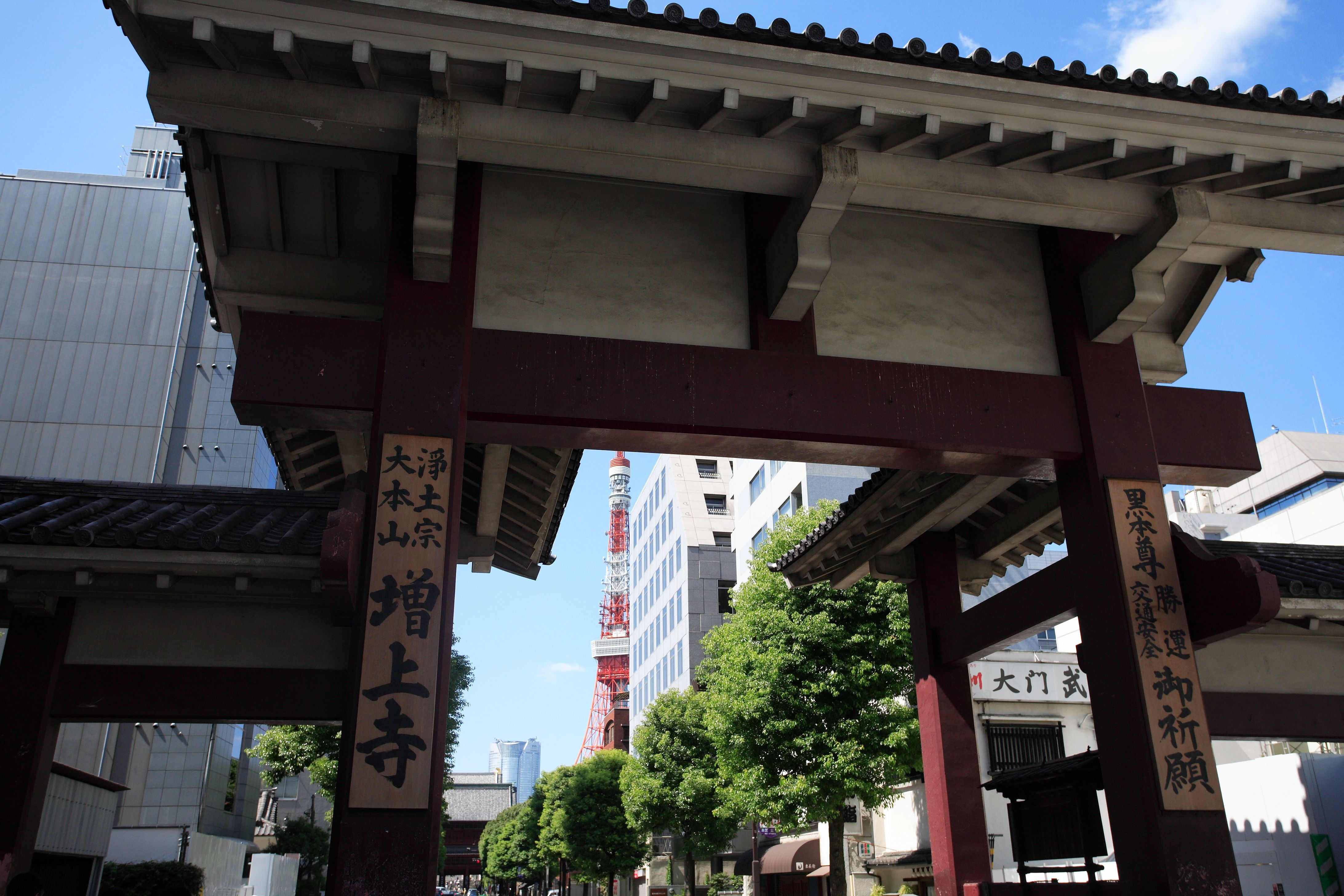 Zojoji-temple, Minato Ward , Tokyo , Japan.